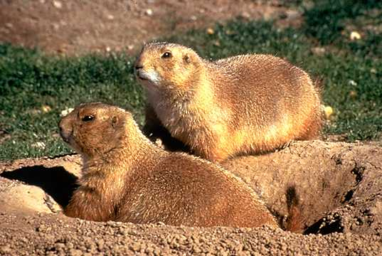 Prairie Dogs